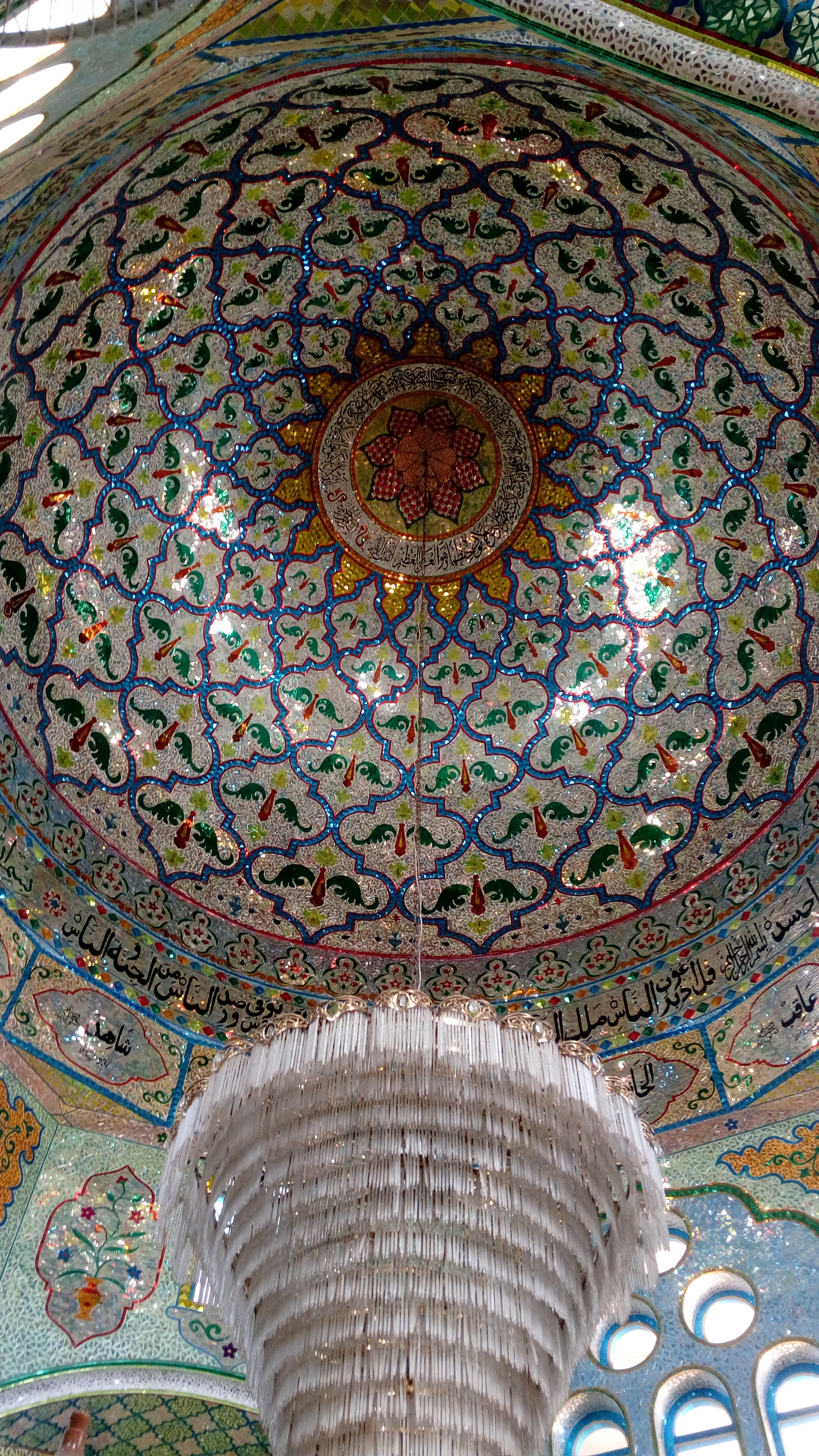 Glass studded roof of Bukhari Pir Dargah at Mundra, Kutch, Gujarat, India